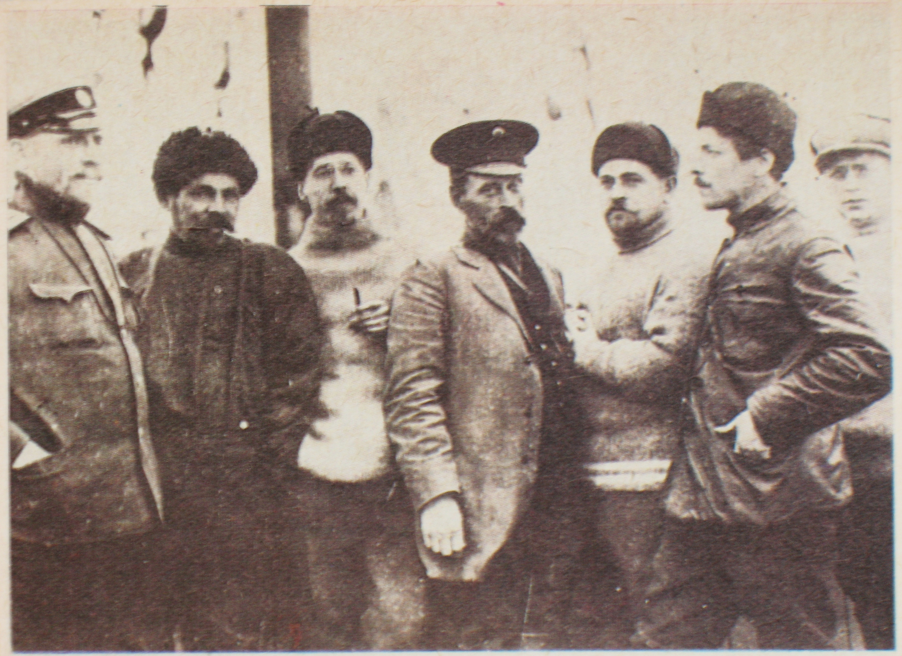 Руководитель экспедиции лейтенант Г.Я. Седов с членами команды на борту экспедиционного судна «Святой мученик Фока». 1912 или 13 г. Слева направо: командир Г. Седов, доктор Кушаков, геолог Павлов, художник Пинегин, Визе, Г.Линник, А.Пустошный. Фото из журнала "Вокруг Света", 1940 год (публикация в СССР). Состав экспедиции на фотографии - из описания фото А. Пустошного, сделанного в 1934 и опубликованного в статье о Г. Седове в журнале "Вокруг света" в 1940.